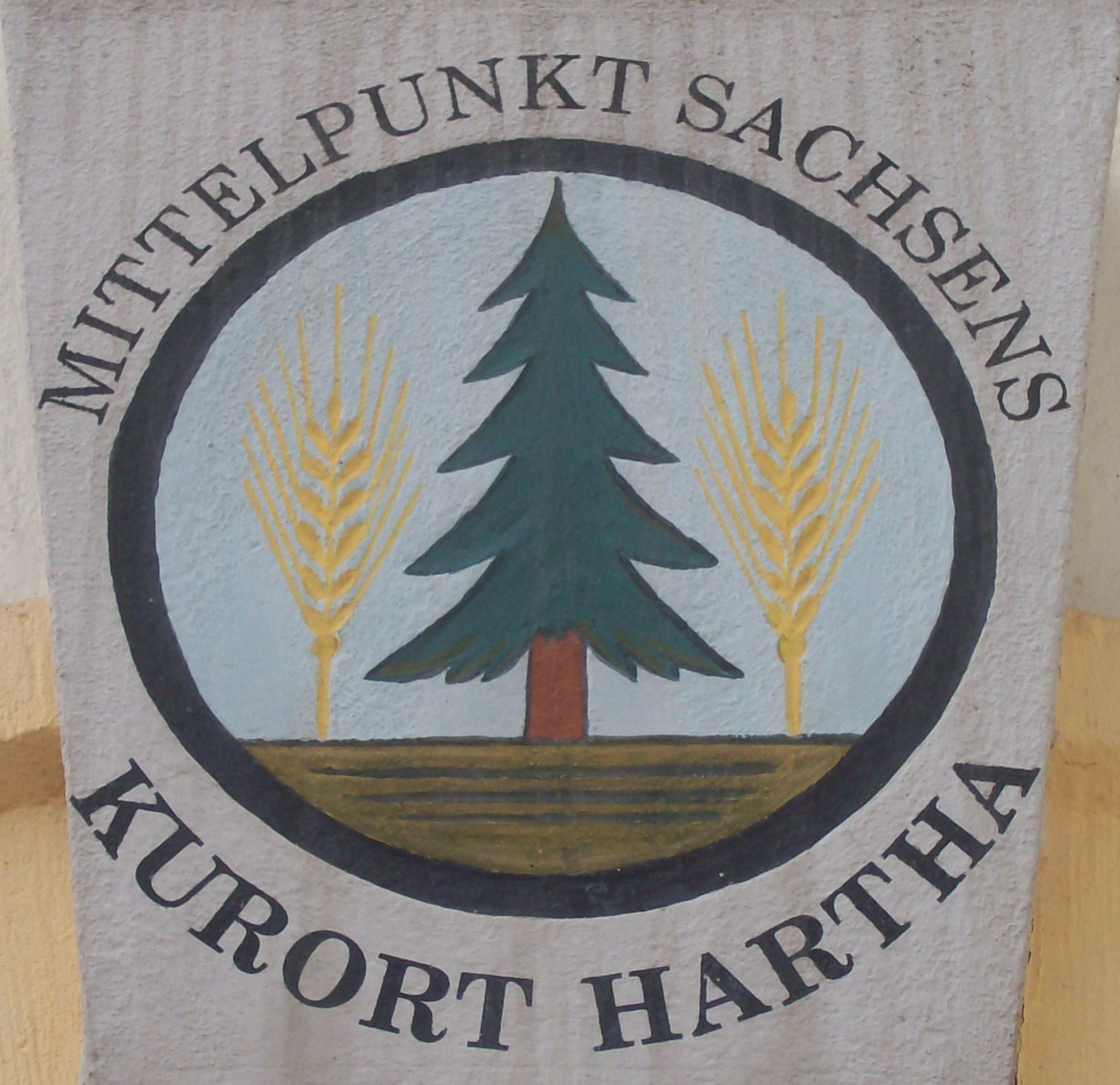 Ortswappen Kurort Hartha am Gemeindeamt